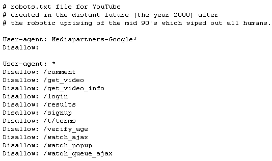 File Robotx.txt di YouTube